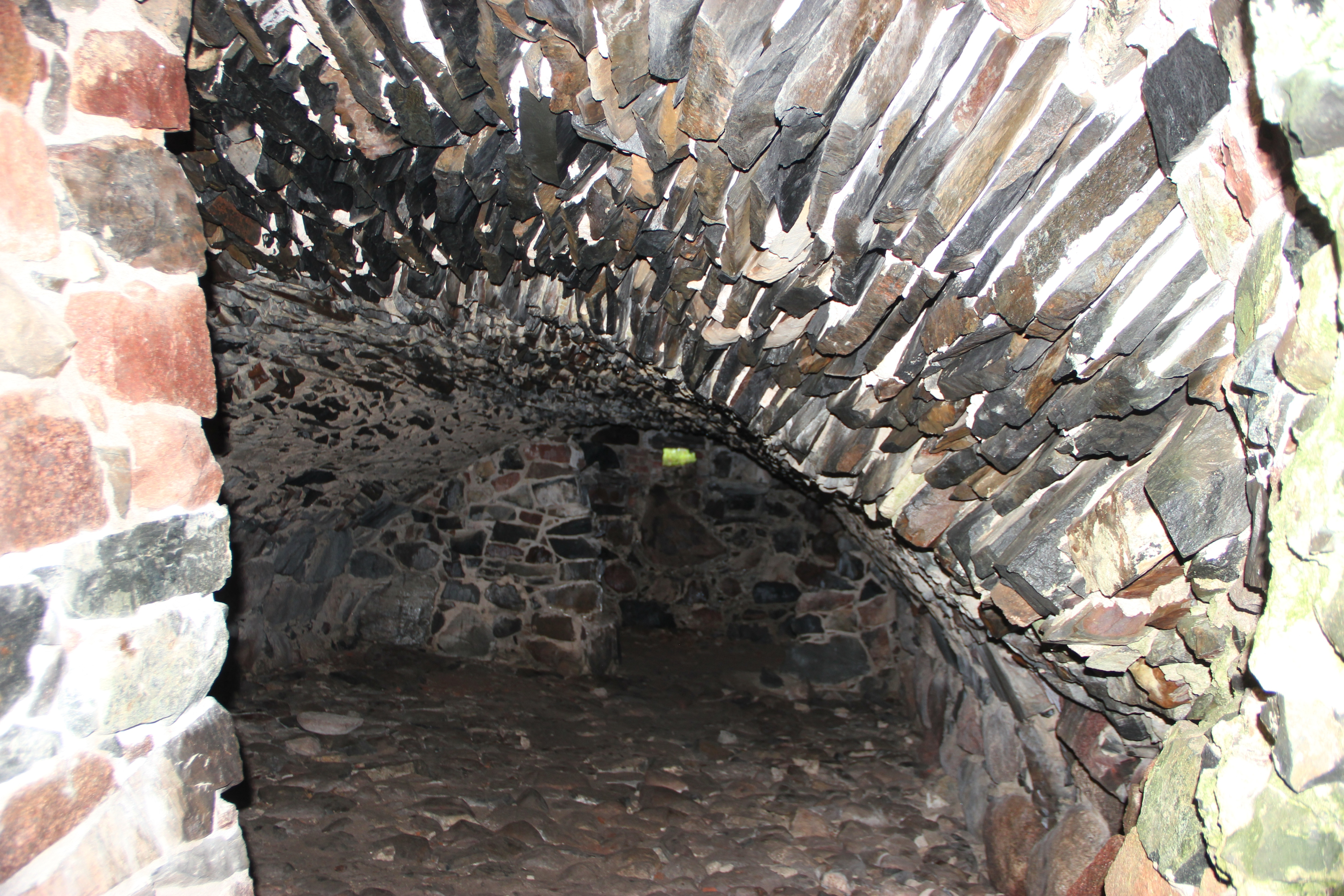 Kellarin holvattu katto, Haapaniemen linna, Kisko, Salo